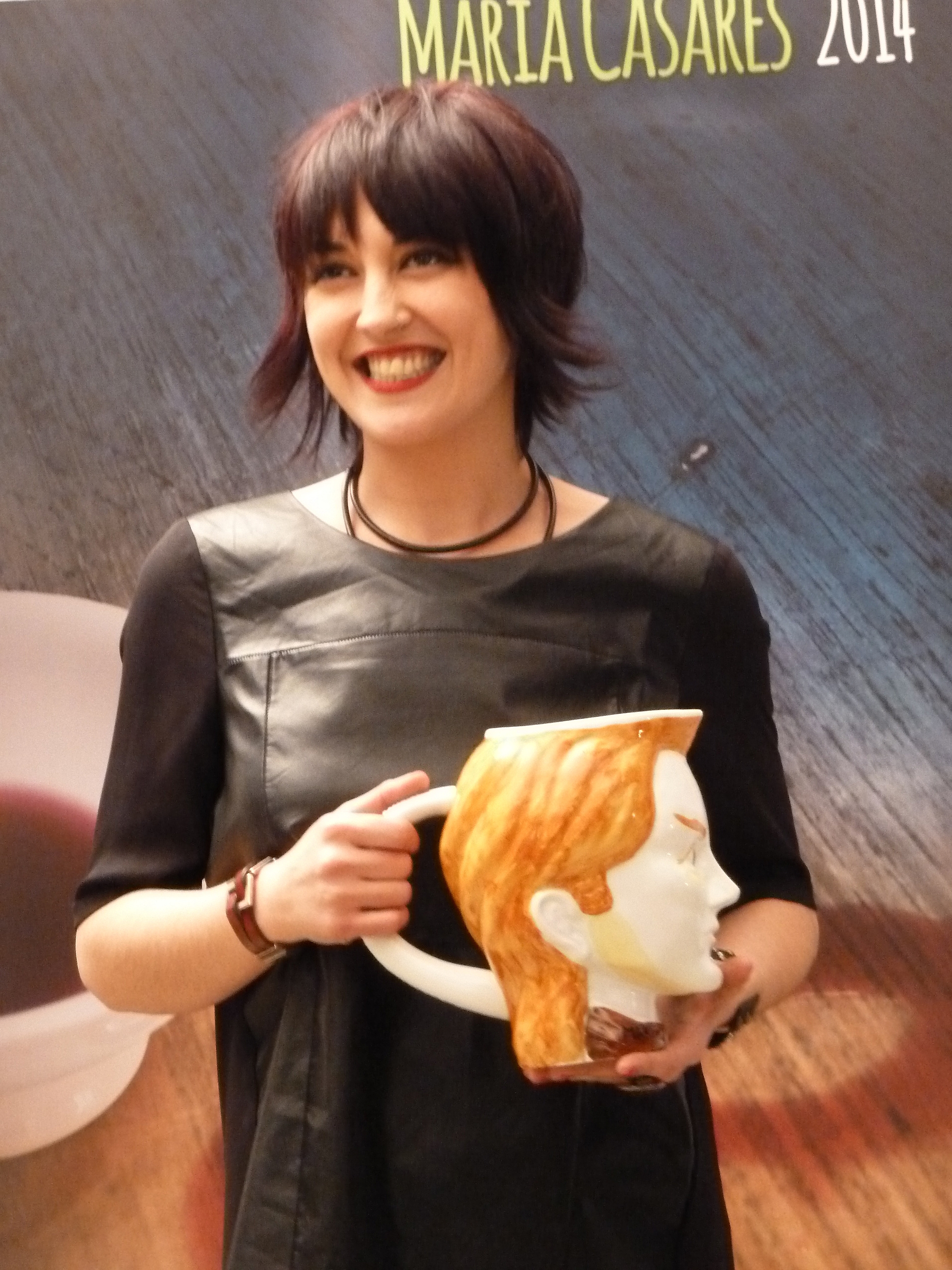 Trini F. Silva na gala dos premios María Casares 2014.